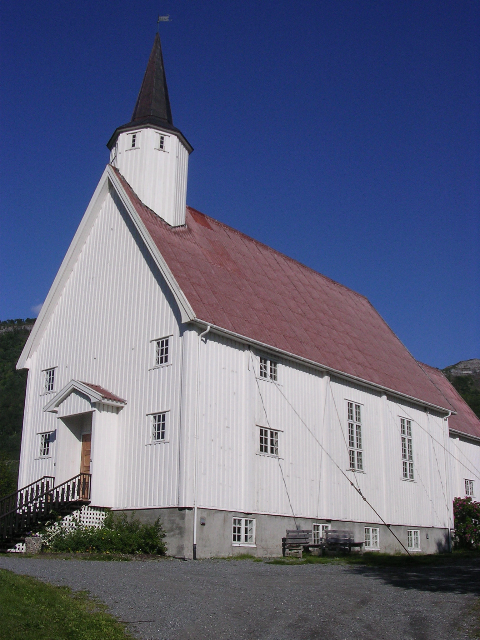 Aldersundet kirke, Lurøy, Nordland